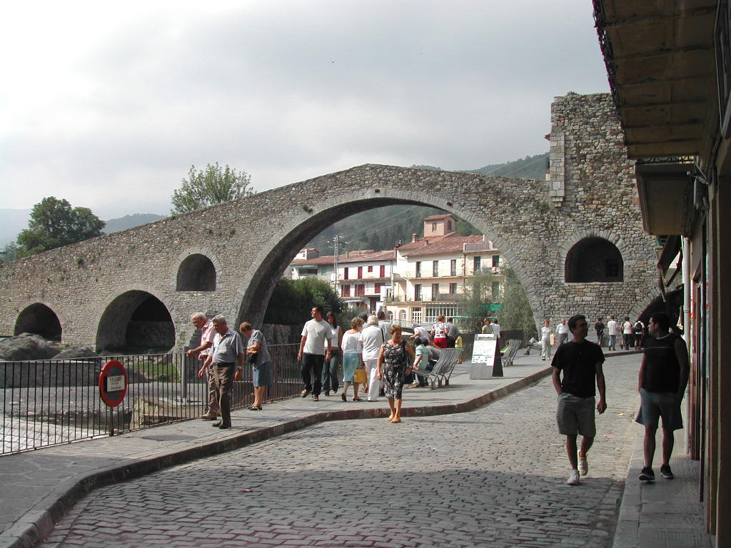 Imágenes de Camprodón intentando que se aproximaran a los encuadres de algunas viñetas de "Los cerditos de Camprodón".